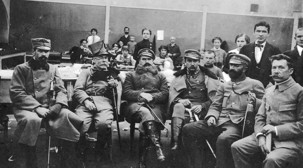 Żołnierze intendentury Legionów Polskich wraz z Józefem Piłsudskim w Zakopanem. Na zdjęciu widoczni: Trojanowski, Wacław Sieroszewski. Józef Piłsudski, Tadeusz Kasprzycki, Walery Sławek. W gazecie Ilustrowany Kuryer Codzienny. 1939, nr 95 (5 IV) na stronie 4 błędnie podano, że zdjęcie wykonano w roku 1917